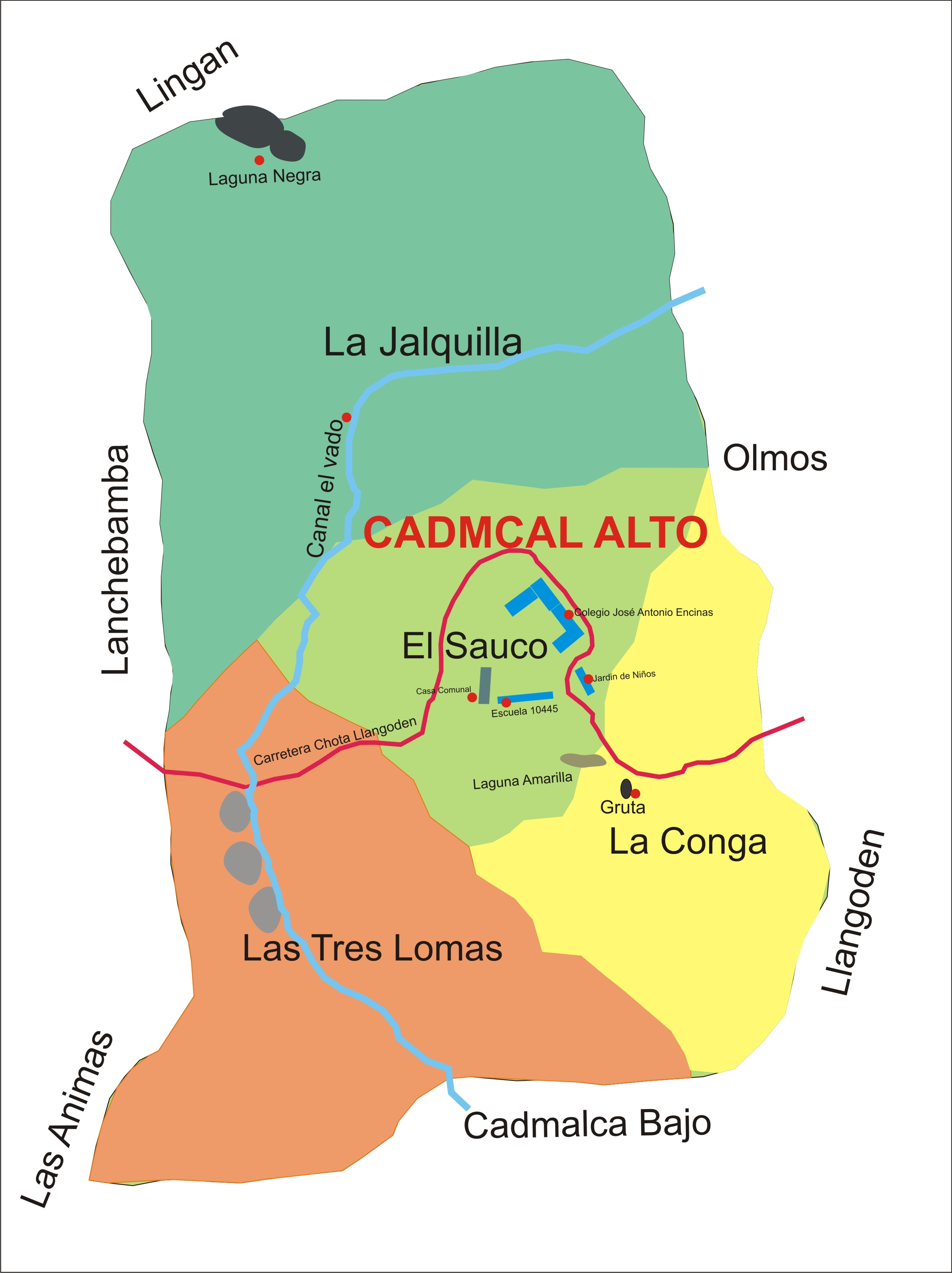 Mapa del Centro Poblado de Cadmalca